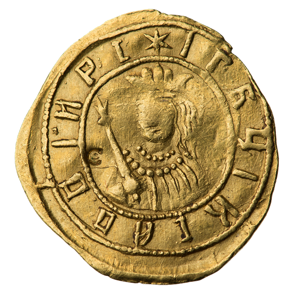 Пол-угорского. Софья Алексеевна (1682—1689) (реверс). ГМ 12.I.12 (редкая); Биткин II 94.3 (R3). Поясной портрет царевны Софьи, слегка влево. В правой руке скипетр. Круговая надпись: * I Г Б Ц I К С А В В I И Р С (И ГОСУДАРЫНЯ БЛАГОВЕРНАЯ ЦАРЕВНА И КНЯЖНА СОФЬЯ АЛЕКСЕЕВНА ВСЕЯ ВЕЛИКАЯ И ИНЫХ РОССИИ САМОДЕРЖЦЫ). Слева от портрета Софьи Алексеевны клеймо известного российского нумизмата графа Э. фон Гуттен-Чапского (1888—1896).